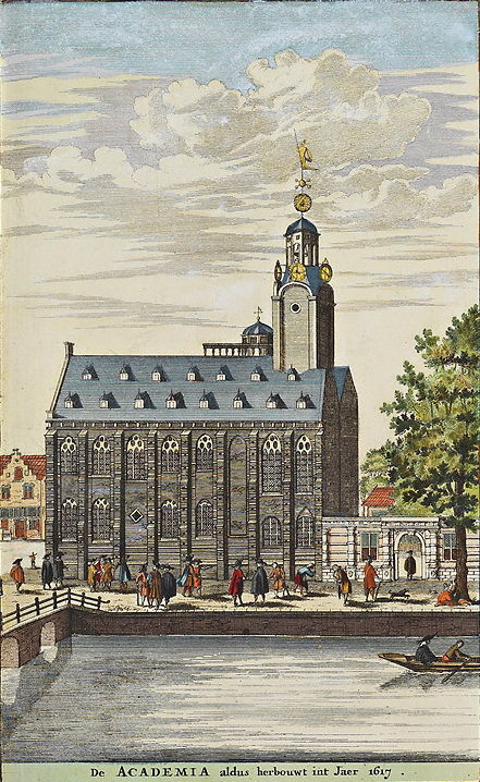 Academiegebouw van Leiden uit het Stedenboek van Frederick de Wit.